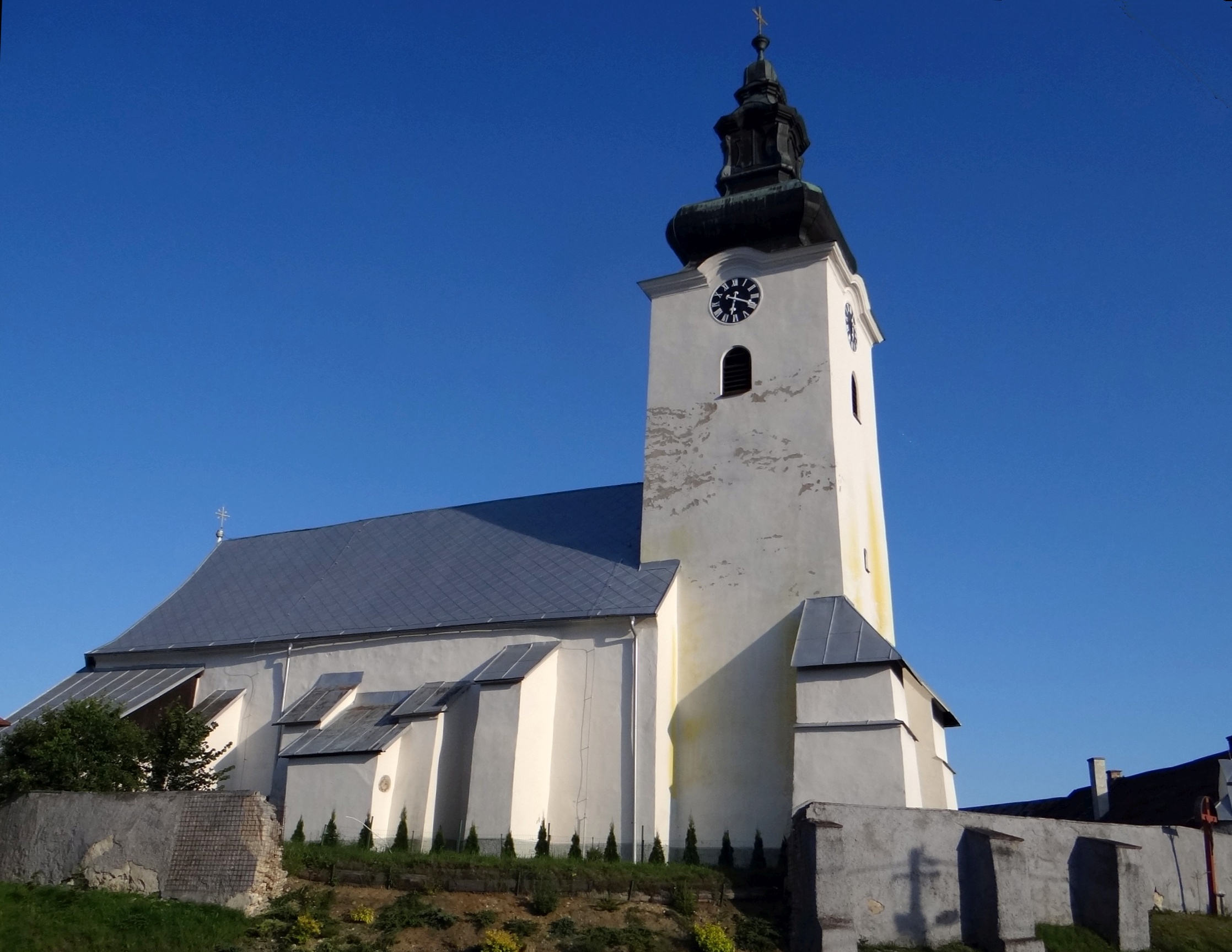 Saint Anne church, Dolná Štubňa